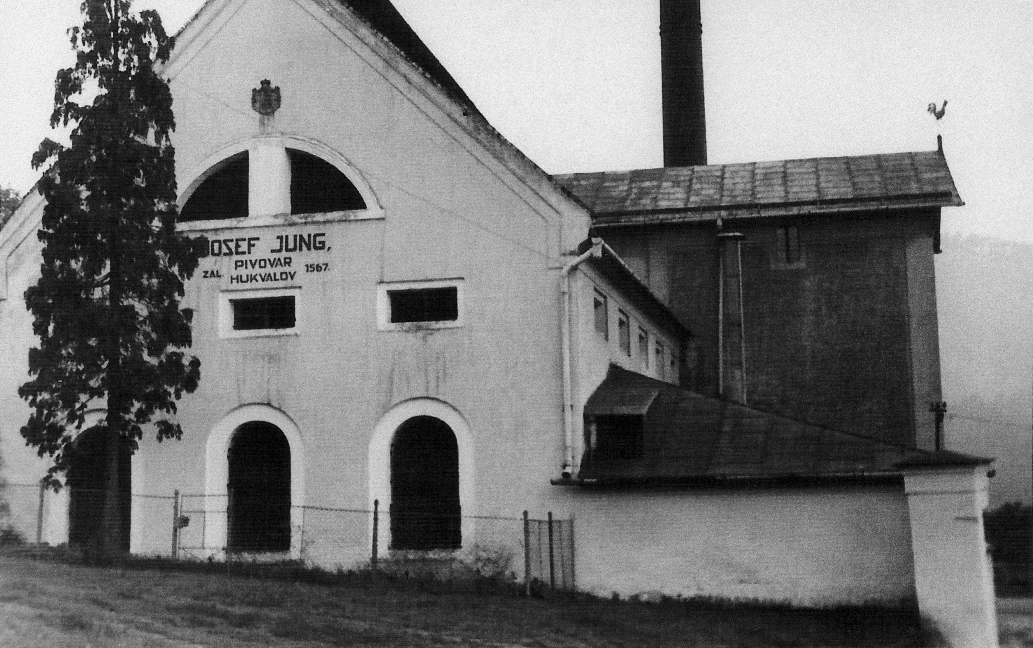 Pivovar Hukvaldy kolem roku 1900 (Czech republic)